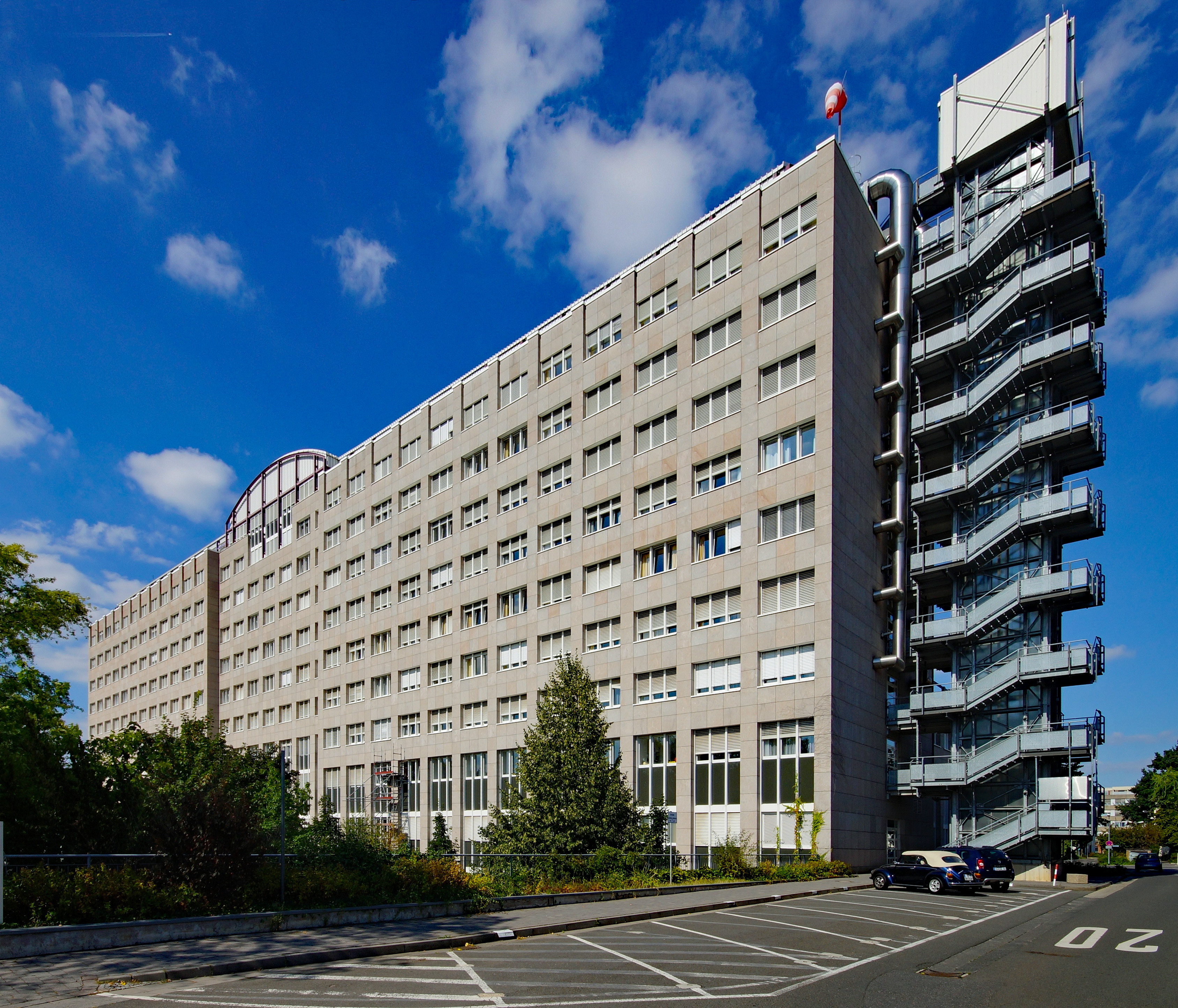 Das Gebäude 505 der Universitätsmedizin Mainz, in dem sich 2018 die Allgemein-, Viszeral- und Transplantationschirurgie, die Anästhesiologie, ein Café, die Klinik und Poliklinik für Neuroradiologie, die Neurochirurgie, die Neurochirurgische Pathophysiologie, die Notfallaufnahme Chirurgie, die Patientenaufnahme, die Physikalische Therapie, Prävention und Rehabilitation und die Radiologie sowie das Zentrum für Orthopädie und Unfallchirurgie befinden.